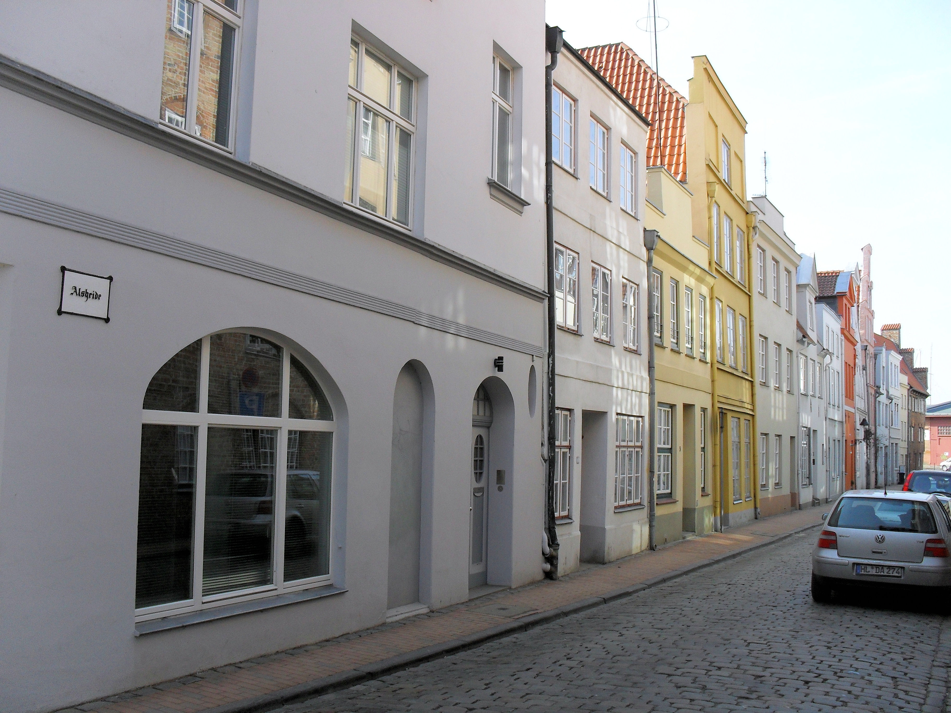 Die Alsheide in Lübeck